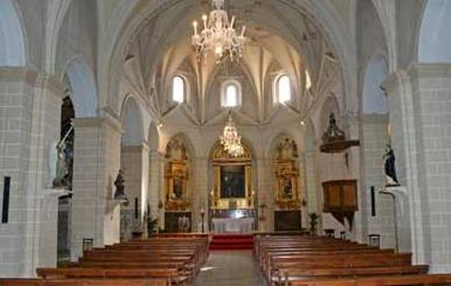 Iglesia de Villar de los Navarros